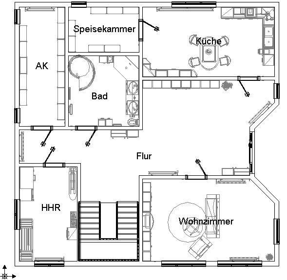 Mit einem PC-Programm erstellt.